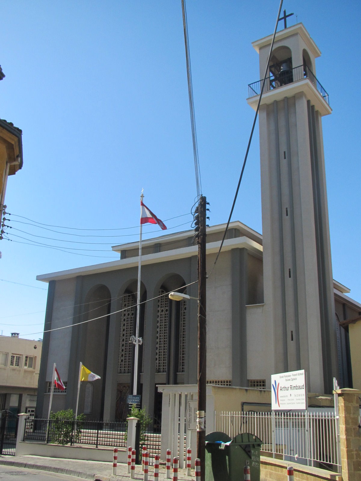 Nicosia by Paride